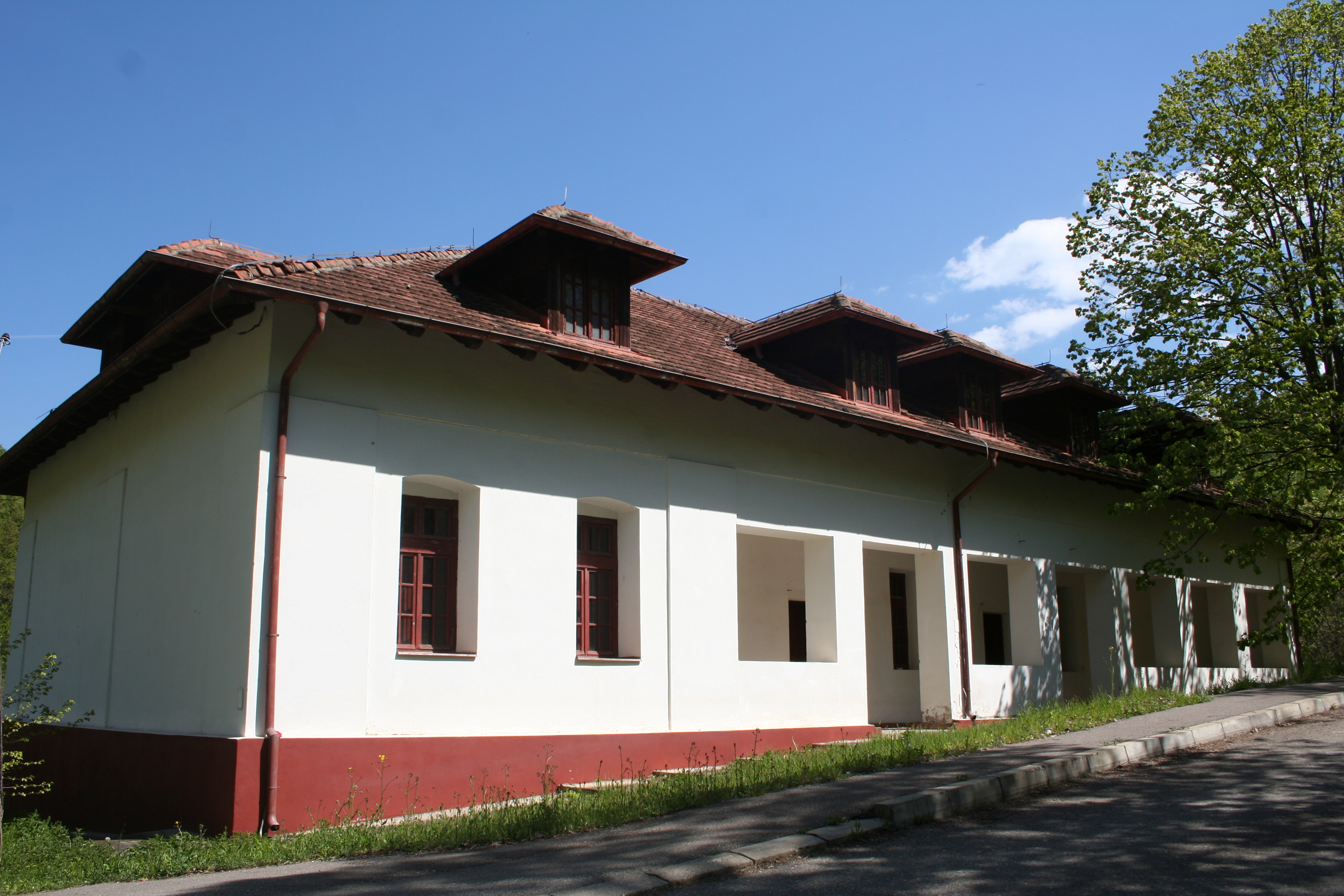 Stara škola u Paštriću